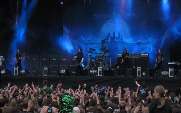 Sonata Artica live Wacken 2008